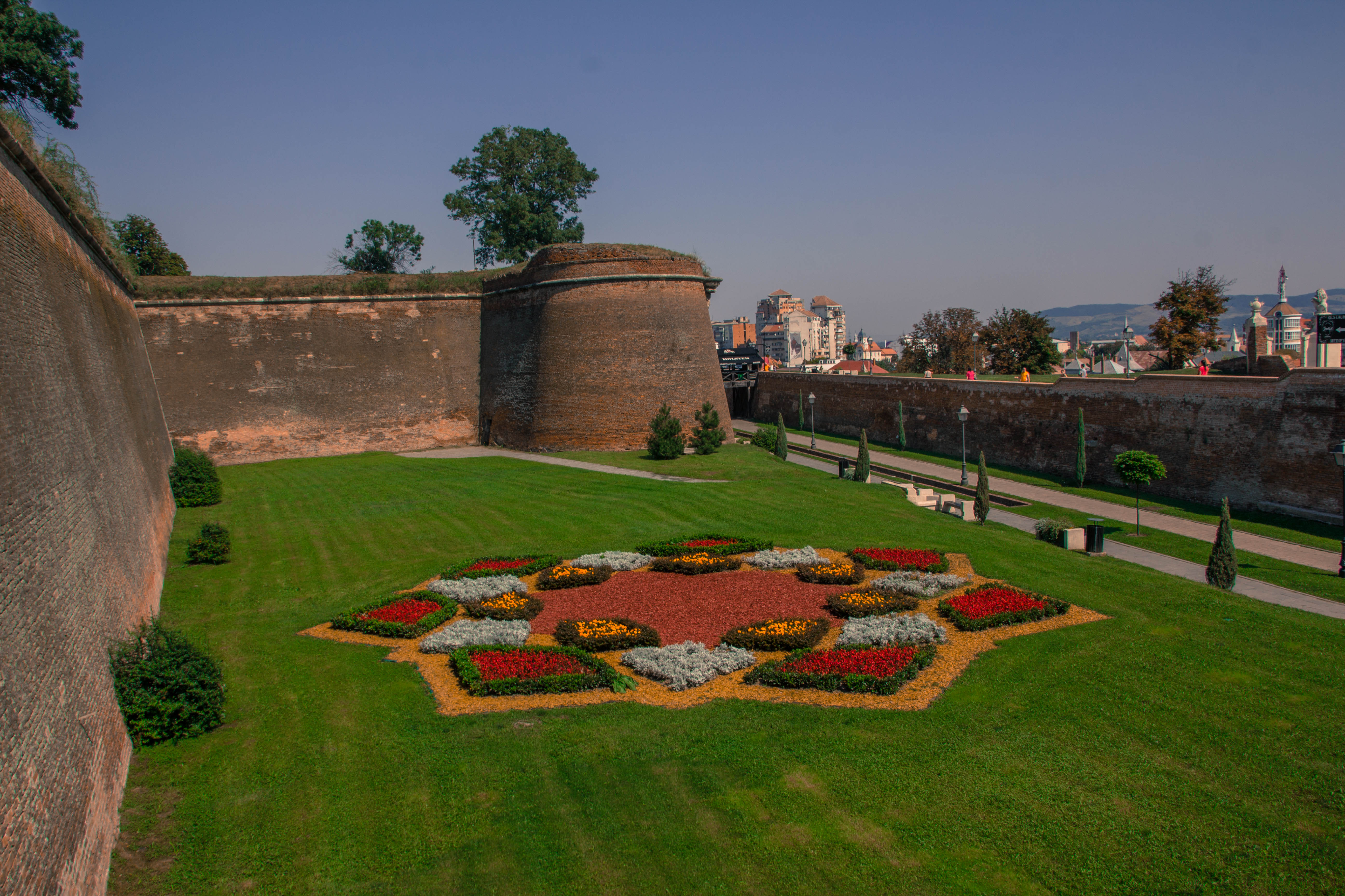 Ansamblul fortificației „Cetatea Alba Carolina”, cu toate componentele: ziduri, bastioane, porți, curtine, raveline, contragărzi, terase bastionare, șanțuri interioare și exterioare, contraescarpe.